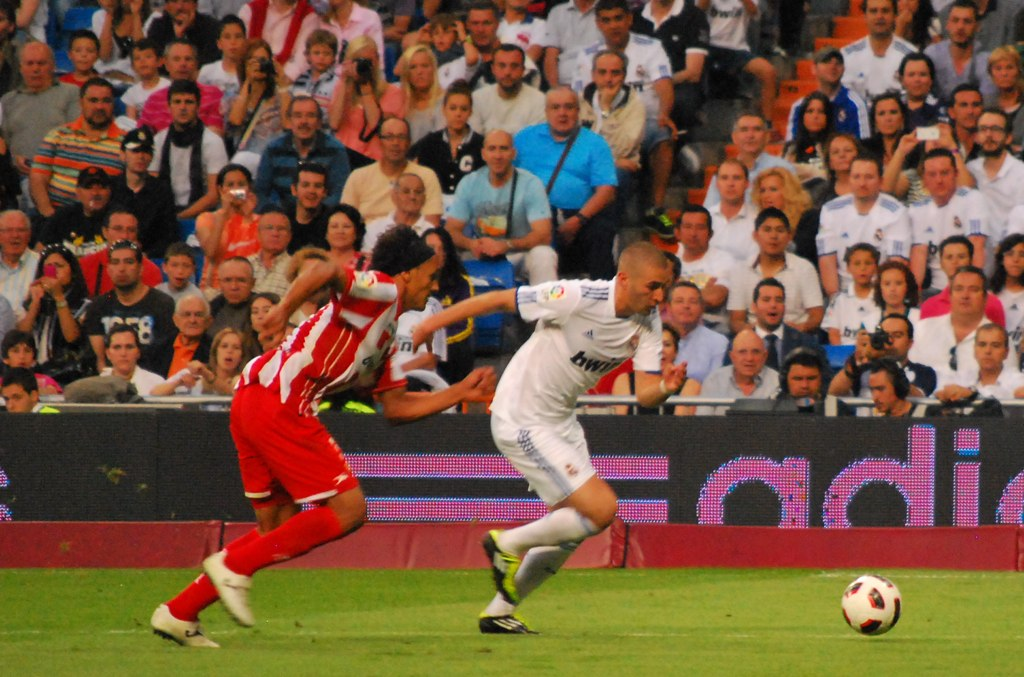 Karim Benzema dribblant Marcelo Silva lors d'un match entre le Real Madrid et l'UD Almería.